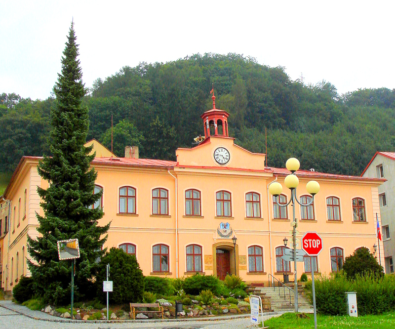 Radnice (Žacléř), Rýchorské nám. 181, Žacléř